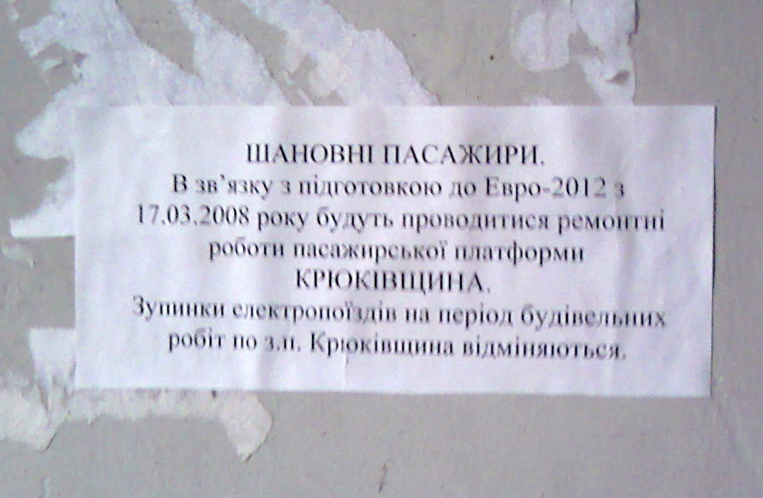 Оголошення про ремонт з.п. Крюківщина (насправді закриття)